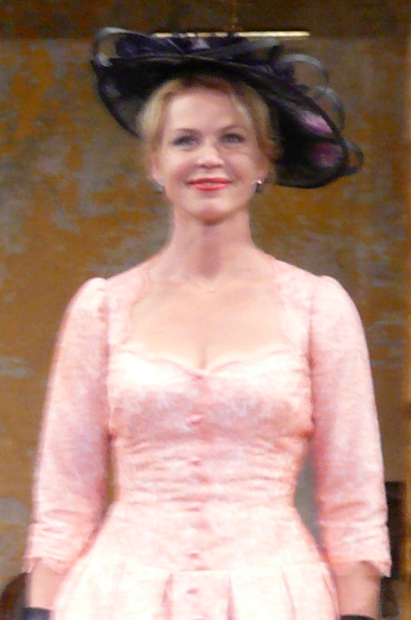 La comédienne française Carole Richert dans "N'écoutez pas, Mesdames !" au Théâtre de la Michodière en septembre 2019, lors des saluts.